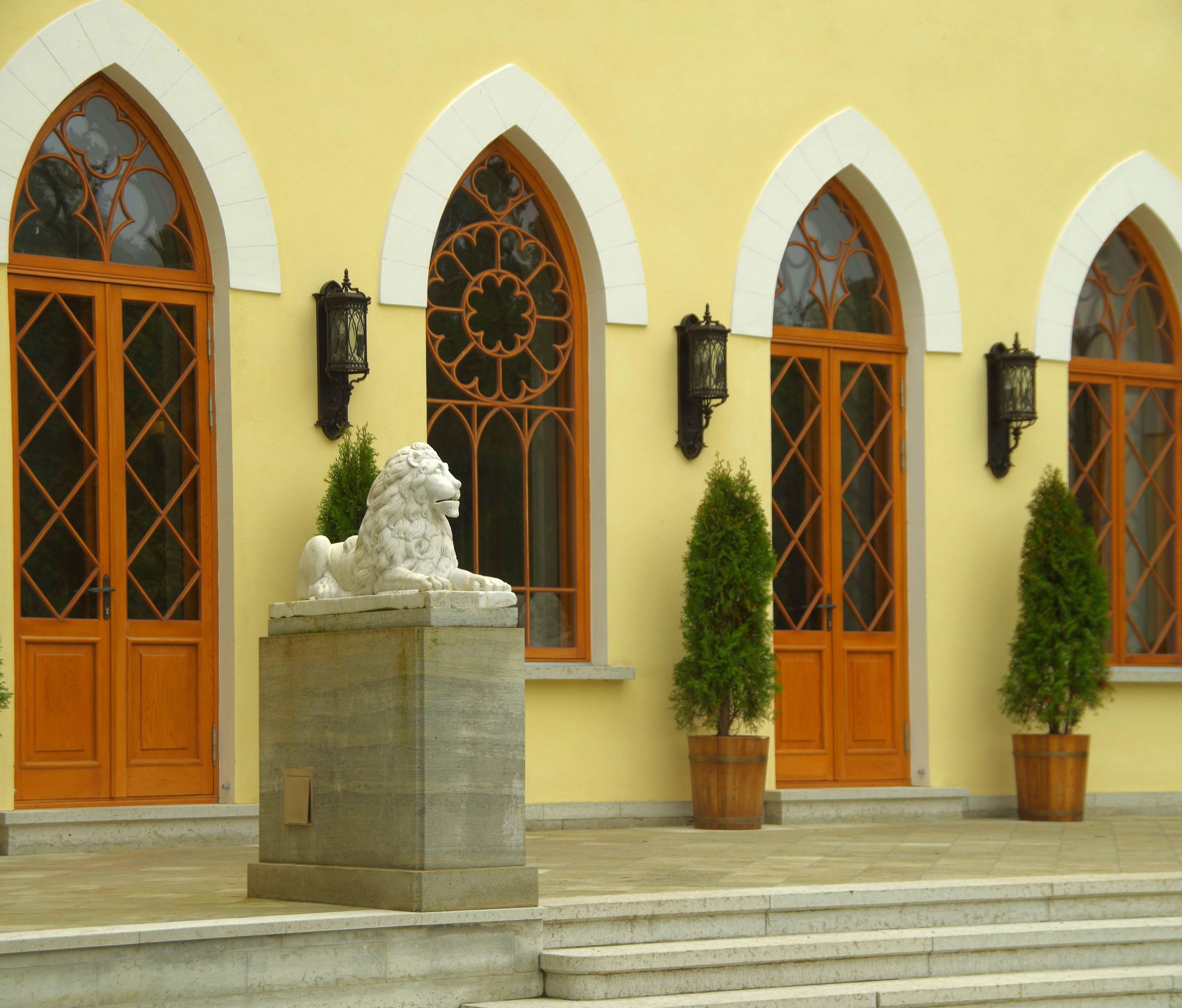 Keila-Joa mõisa peahoone, 1831-33. a.